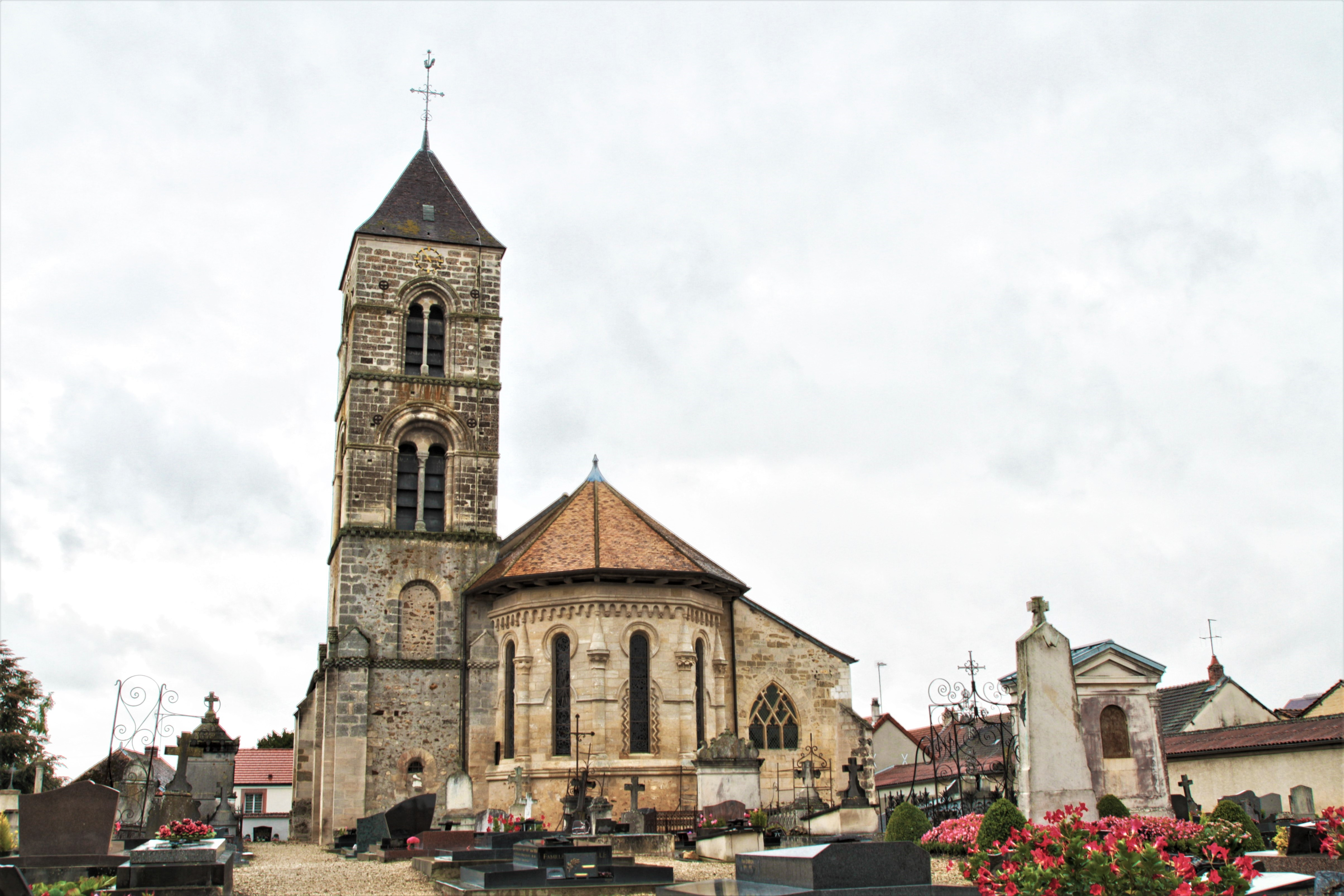 Église Saint-Réol d'Ambonnay, (Classé, 1922) .